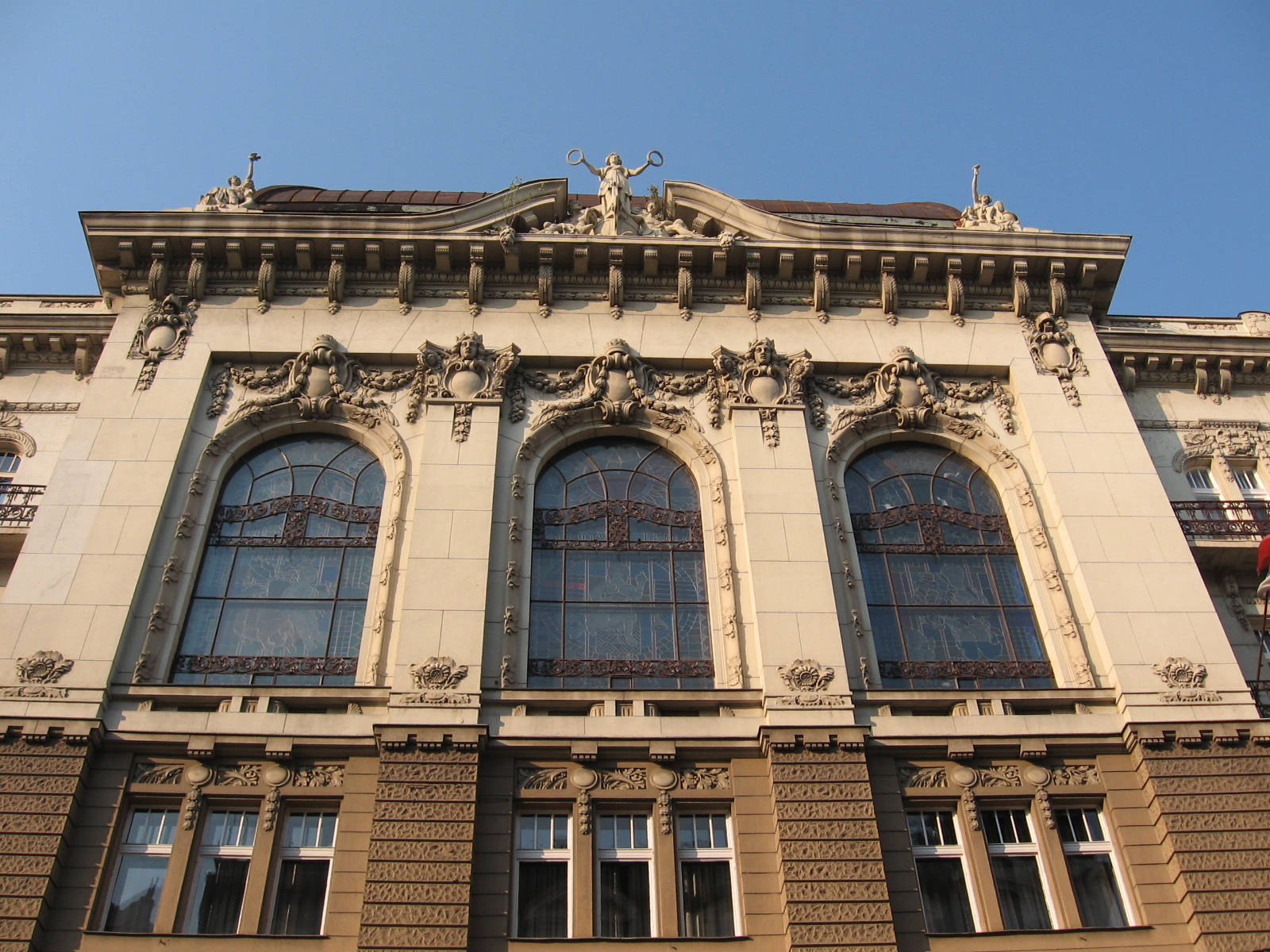 Zgrada SANU, ulica Knez Mihailova, Beograd